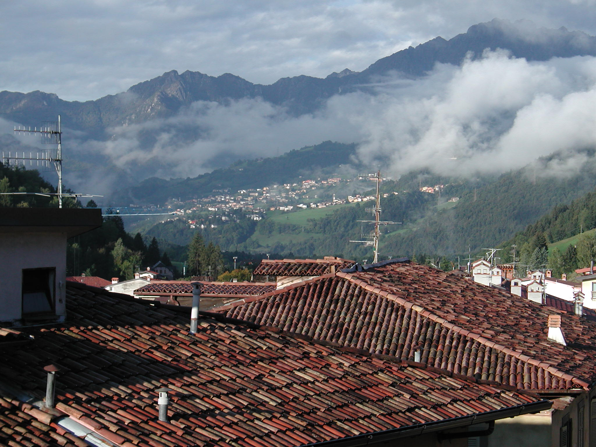 Clusone, provincia di Bergamo, vista sui tetti e Prealpi Orobie Foto fatta da me, ottobre 2005